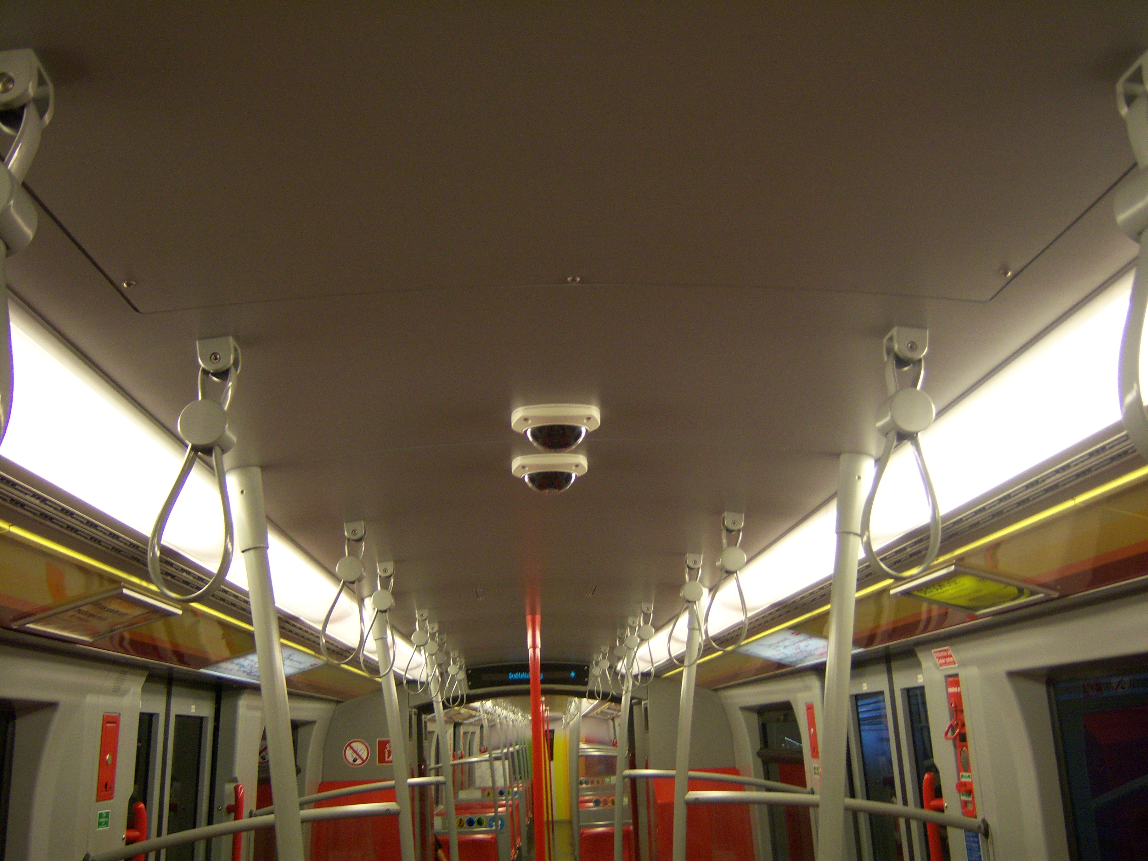 Videoüberwachung im Innenraum eines Typ V der Wiener U-Bahn